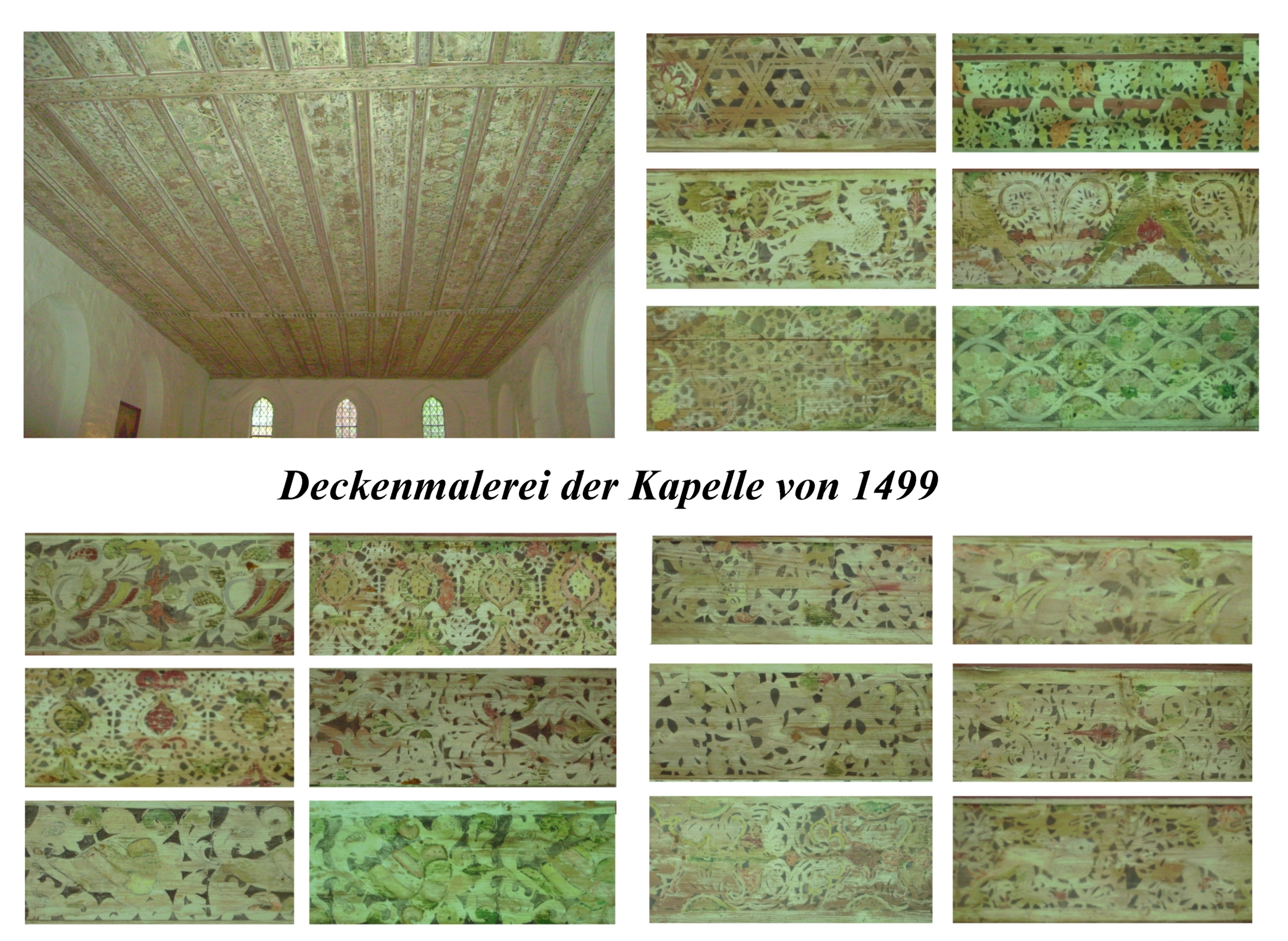 Malerei auf gotischer Flachdecke von1499, aus 11 bis 14 30cm breiten Bohlen, hergestellt mit vorgefertigten Schablonen, unter Denkmalschutz